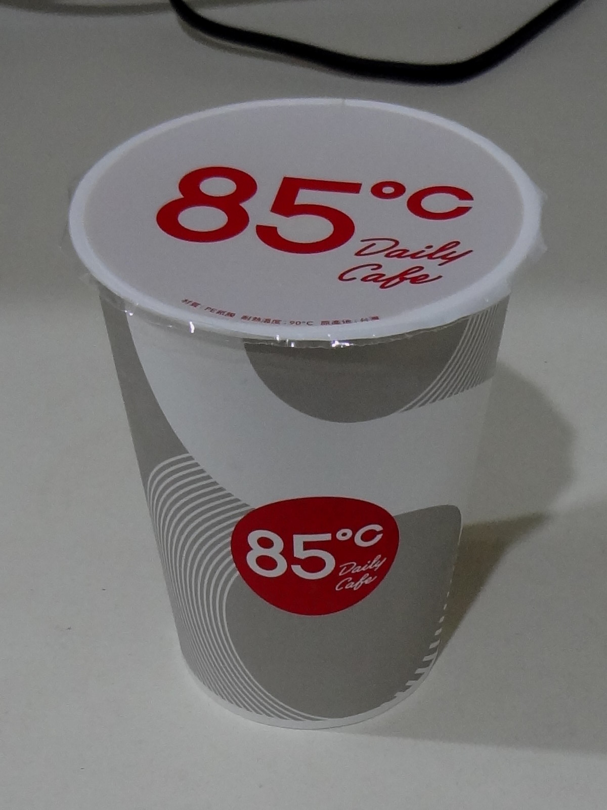 85度C門市售出的小杯冰咖啡。